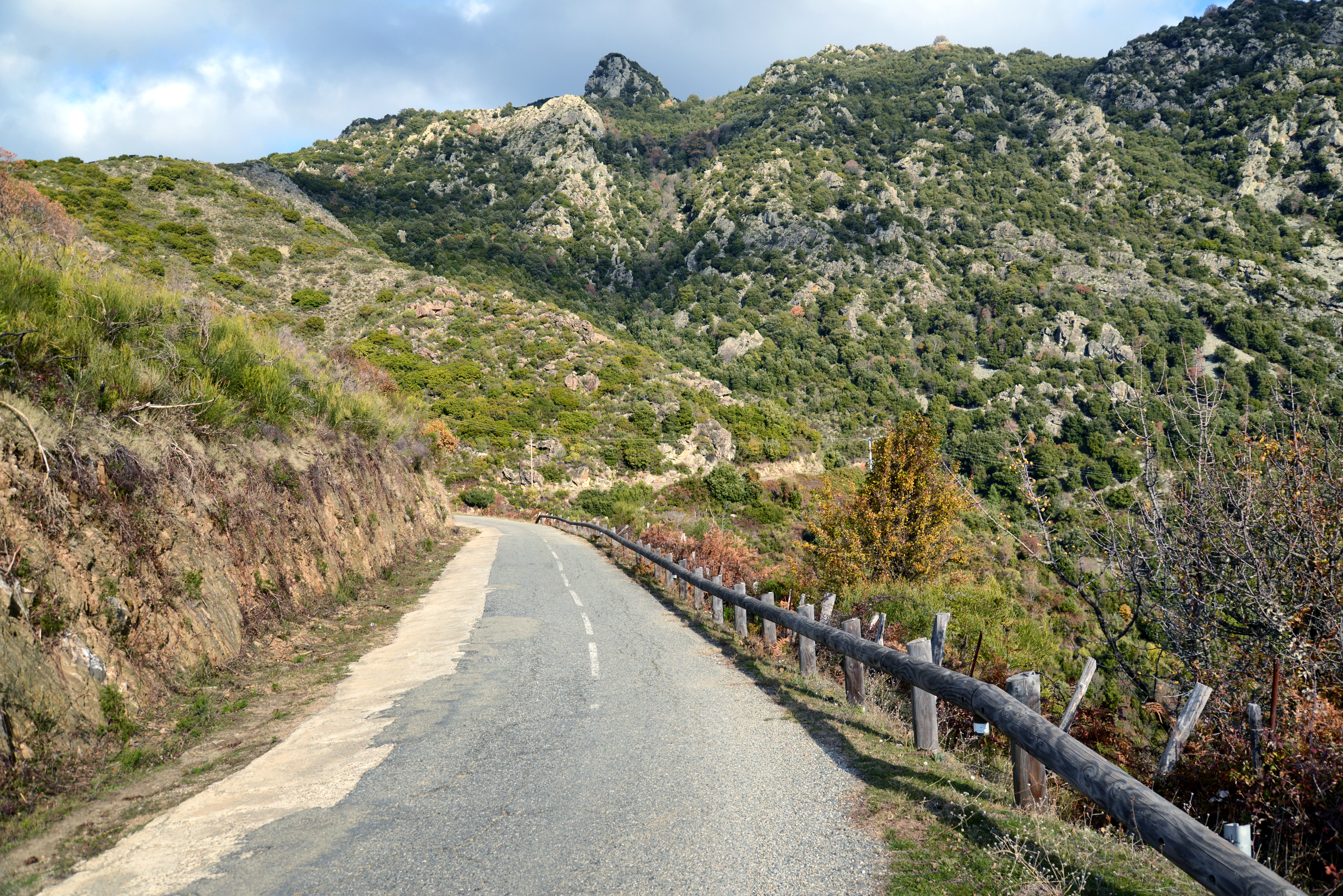 Piedicorte-di-Gaggio, Rogna (Corse) - Route départementale 14, sur les flancs méridionaux du Monte Rosso (969 m)